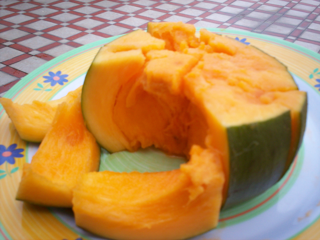 Zapote (Quararibea cordata), Fruto exótico sudamericano.